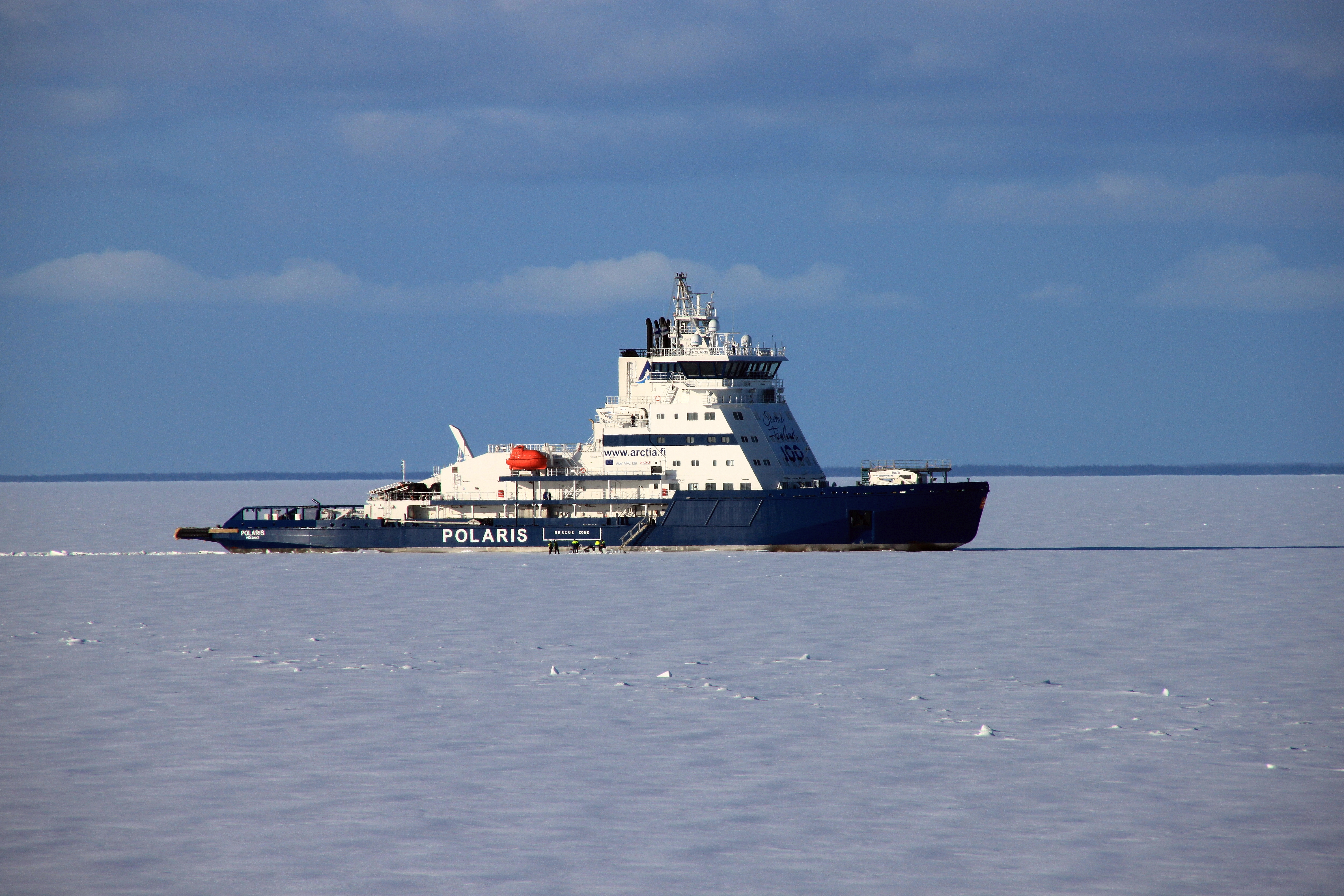 Eisbrecher POLARIS im Eis vor Kemi